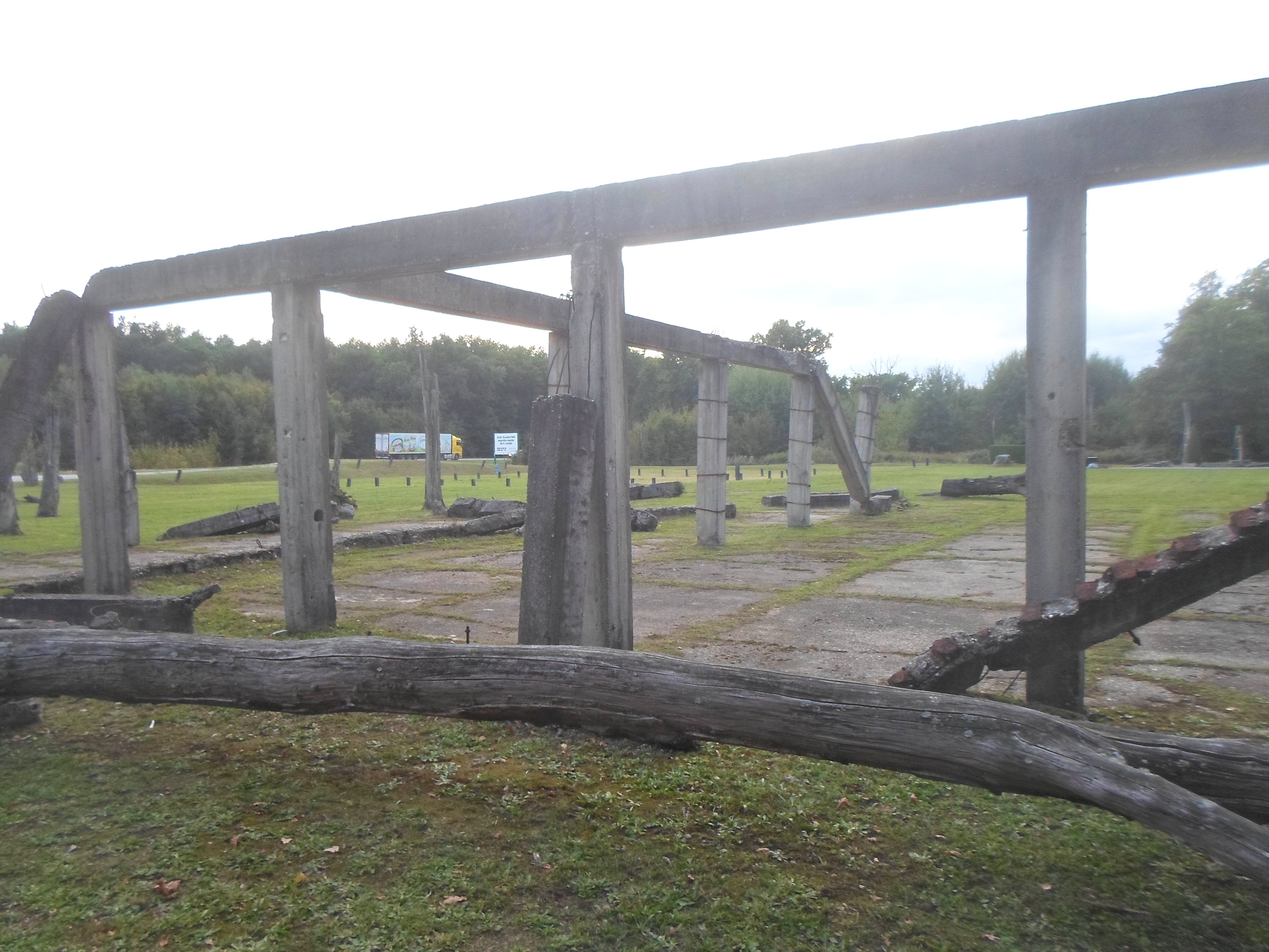 Barutana Bjelovar